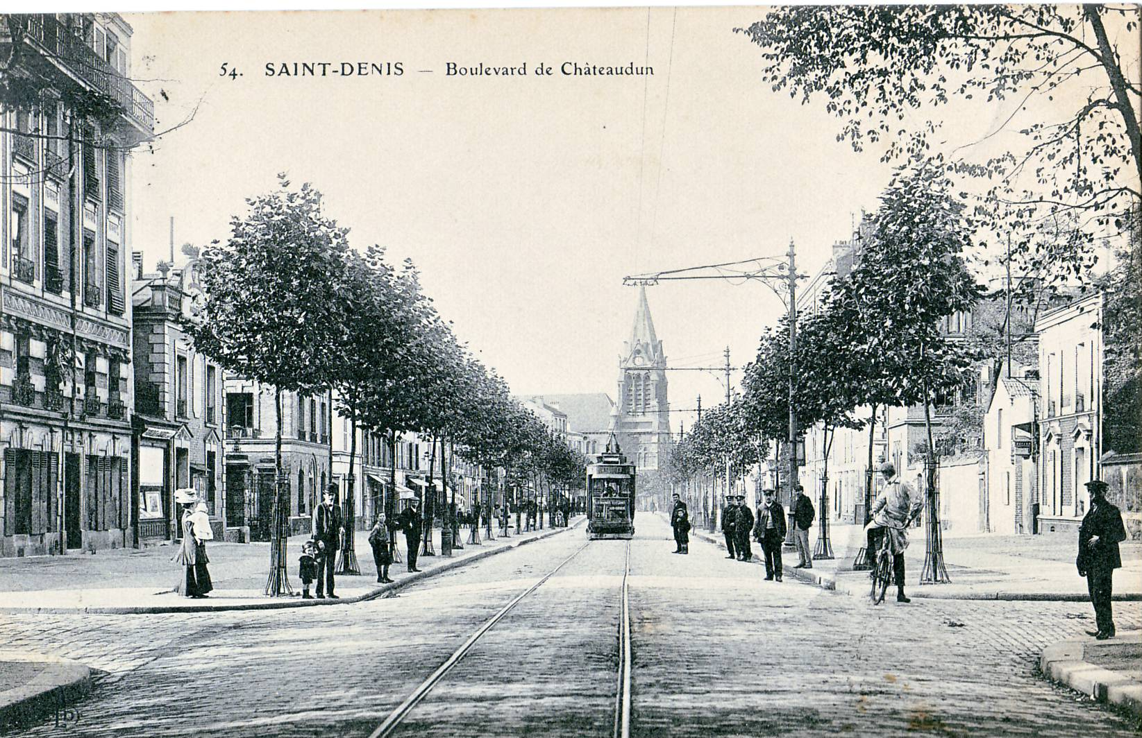 Carte postale ancienne éditée par ELD N°54Saint-Denis : Boulevard de ChateaudunActuel Boulevard Jules GuesdeOn distingue un tramway Nord-Parisien